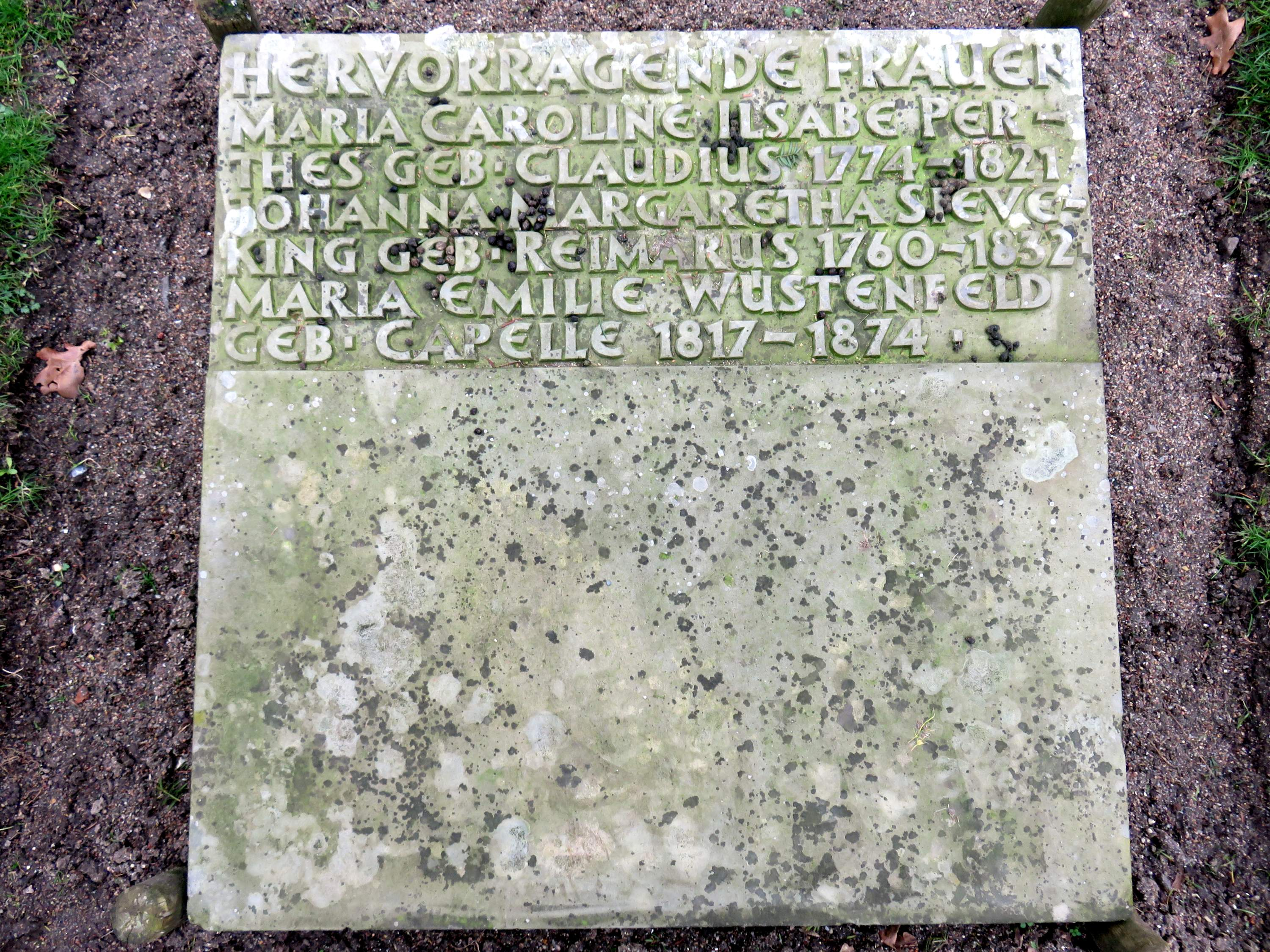 Sammelgrabmal Hervorragende Frauen im Bereich des Althamburgischen Gedächtnisfriedhofs auf dem Hamburger Friedhof Ohlsdorf, Querachse nordwestliche Seite, zu Ehren von Caroline Perthes, Johanna Margaretha Sieveking, Emilie Wüstenfeld.